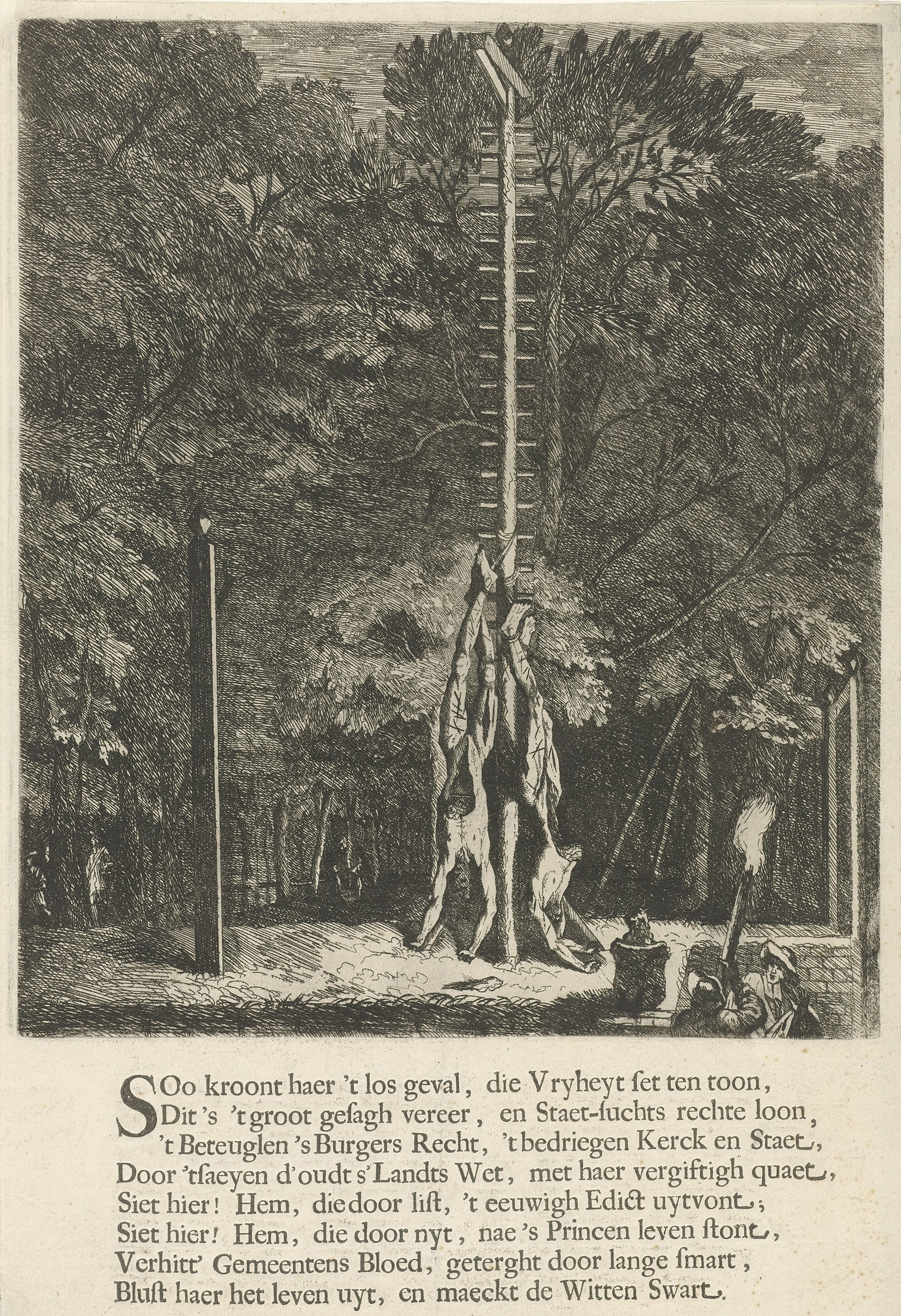 De verminkte lichamen van de gebroeders De Witt hangend aan de wip, 1672. Ets, gravure en boekdruk. Height: 35.5 cm (13.9 in); Width: 24.5 cm (9.6 in). Amsterdam, Rijksmuseum Amsterdam.